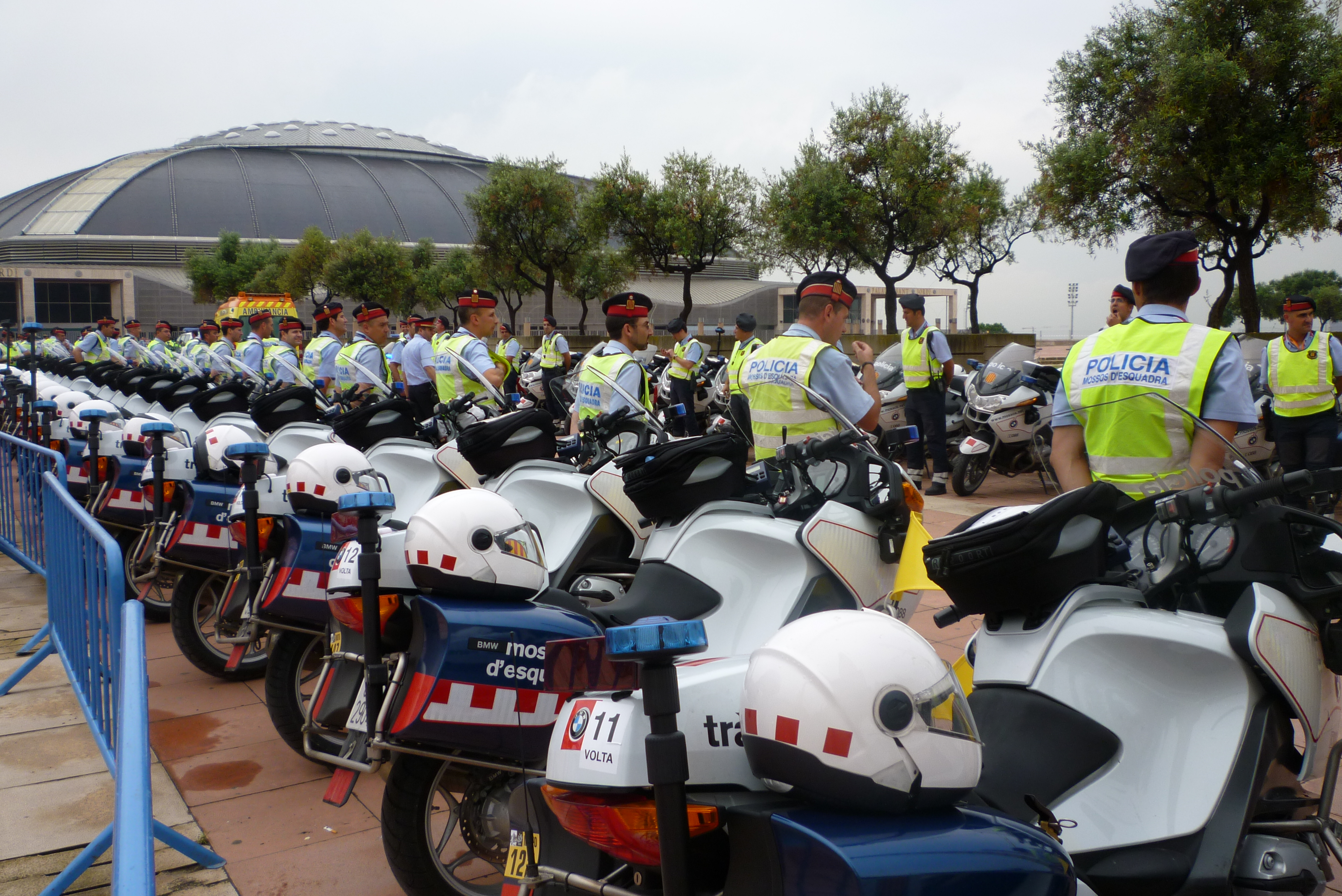 Mossos d'Esquada - Trànsit